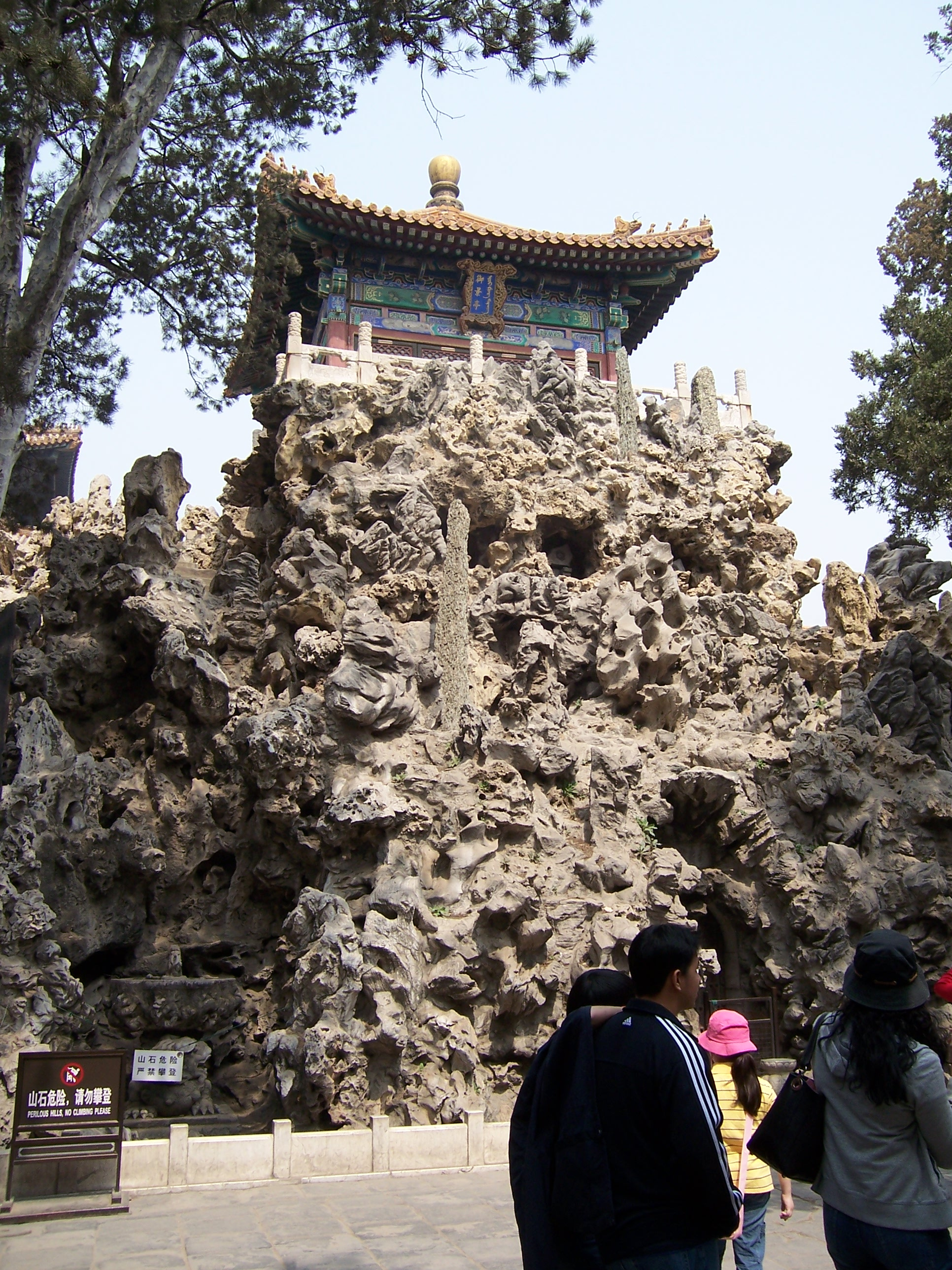 China - Imperial Palace 15